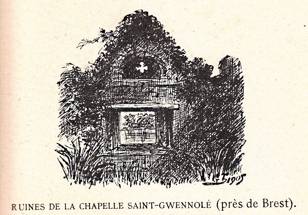 Chapelle Saint-Guénolé de Brest (Finistère, France). Gravure de 1905 extraite d'une brochure sur St Guénolé par le comte de Laigue.